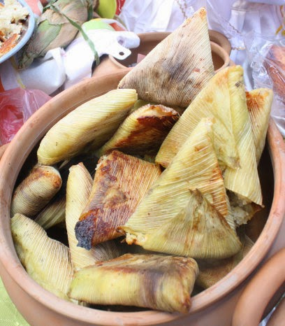 Tamales Bolivianos